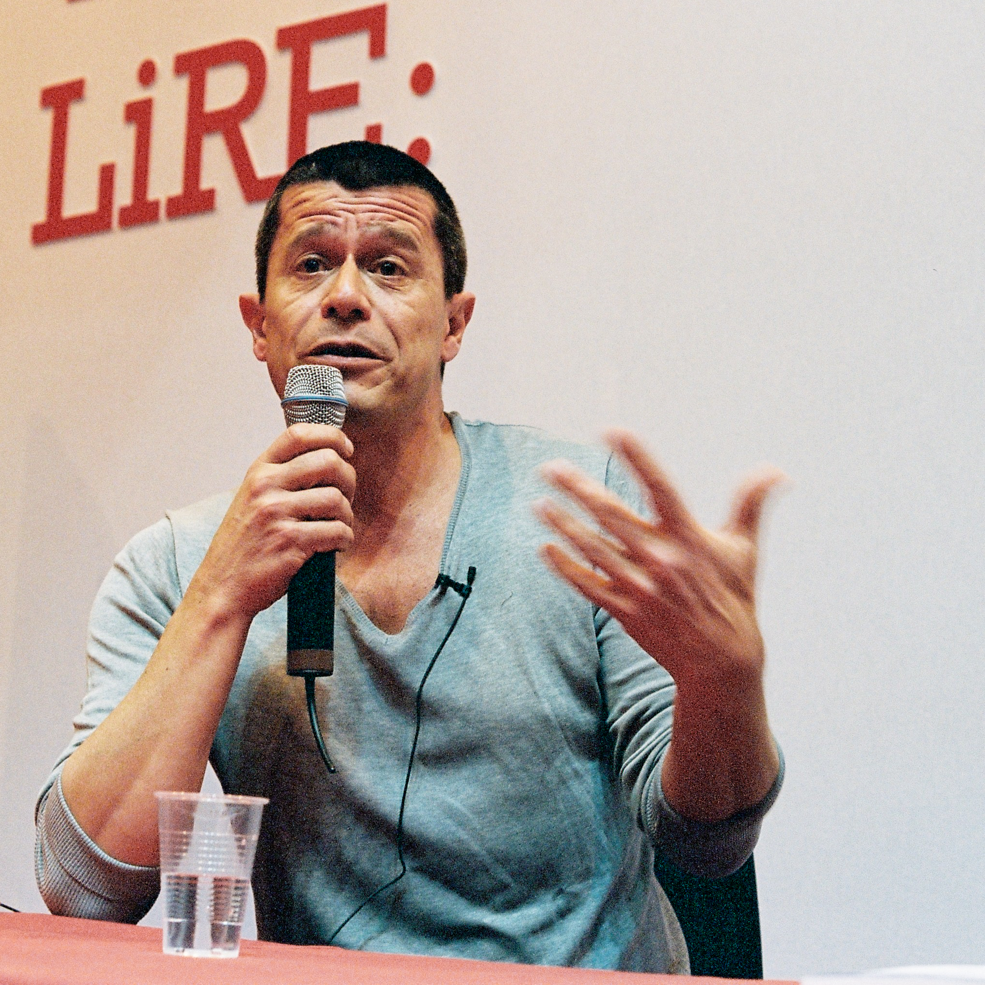 Emmanuel Carrère au salon du livre 2009